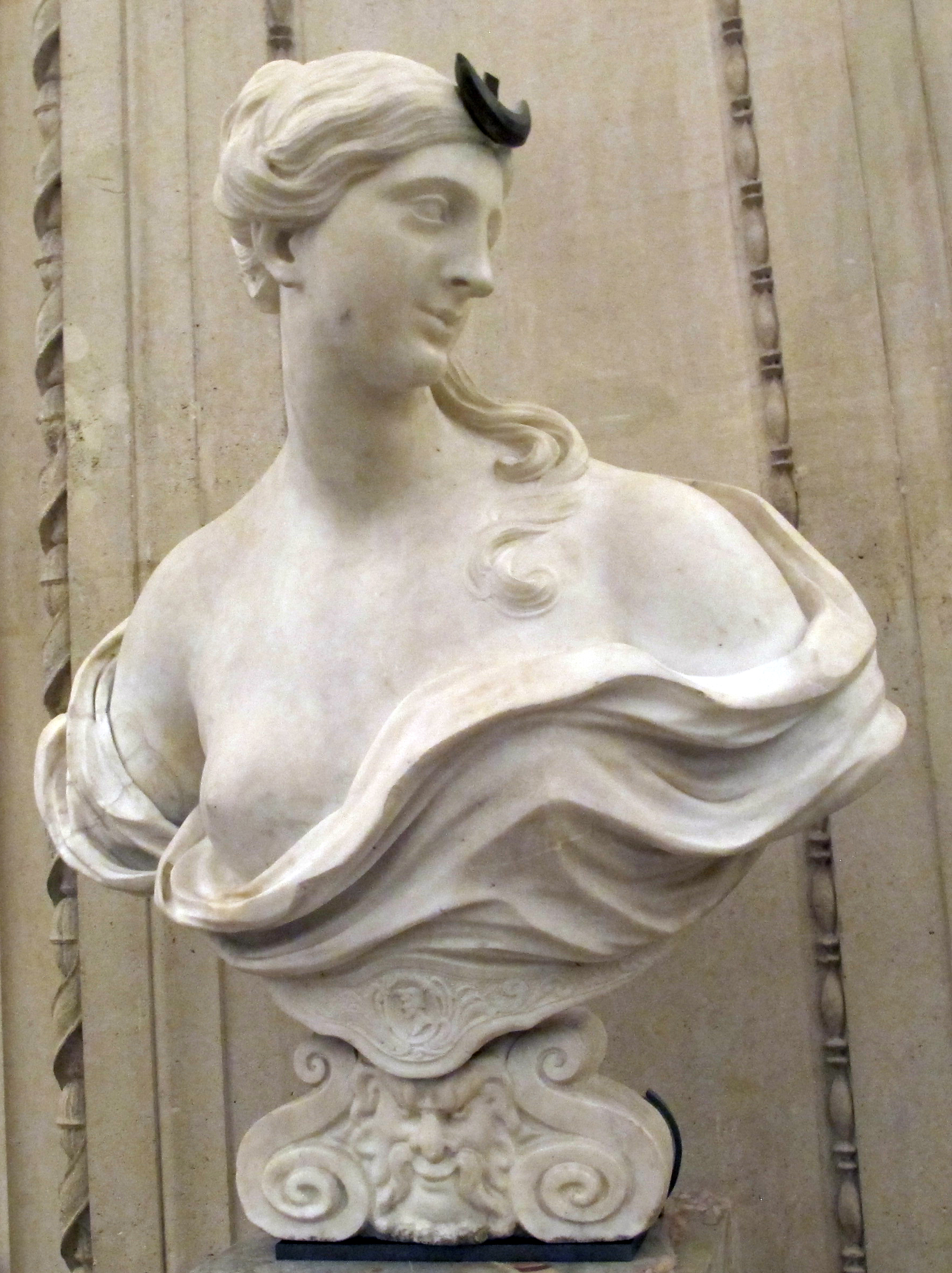 scultura italiana al Louvre